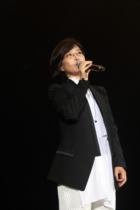 가수 이선희